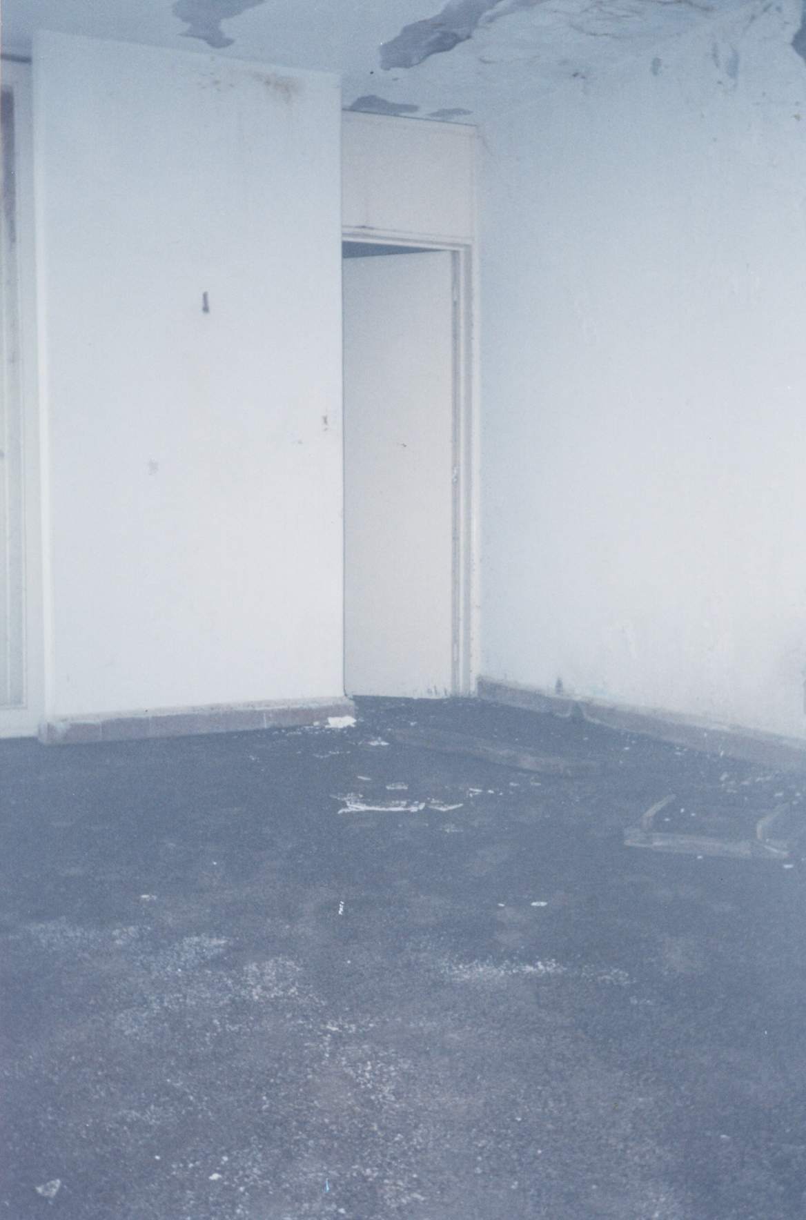 Guano de murciélago en un hotel abandonado en el Parque Nacional Cacahuamilpa